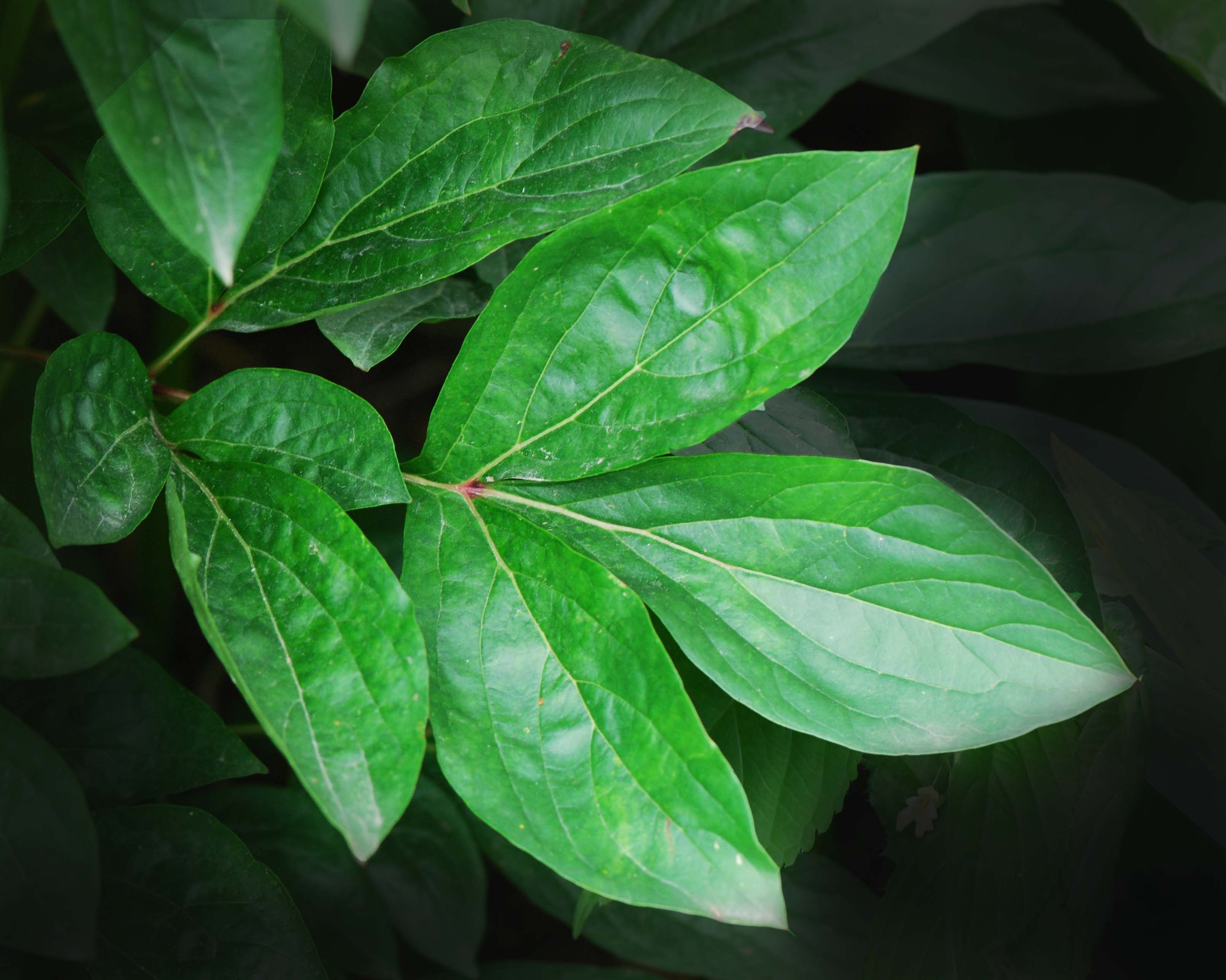 Paeonia lactiflora, "couronne d'or", feuille, Jardin des Plantes de Paris